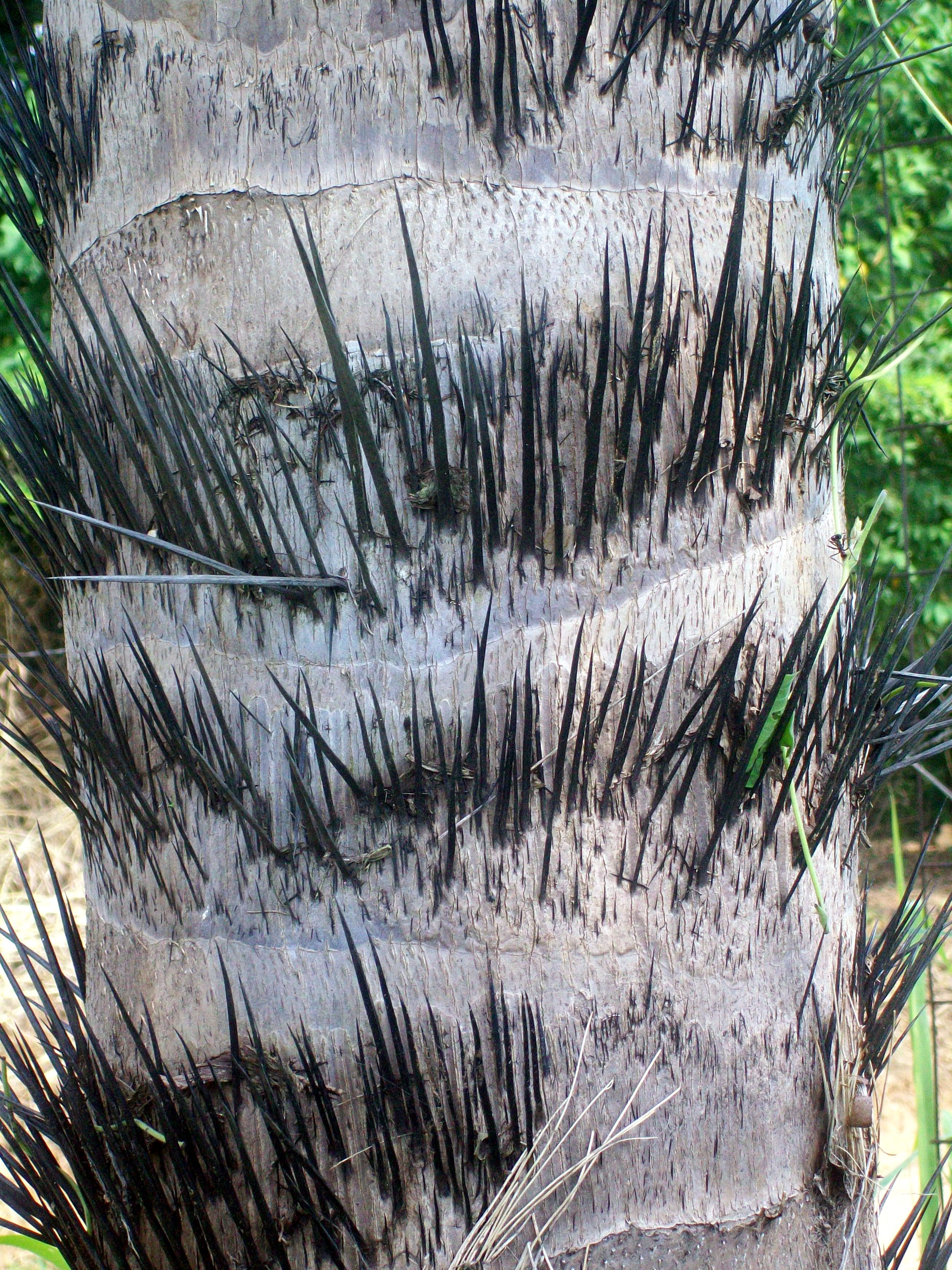 Vista del tallo de Acrocomia aculeata